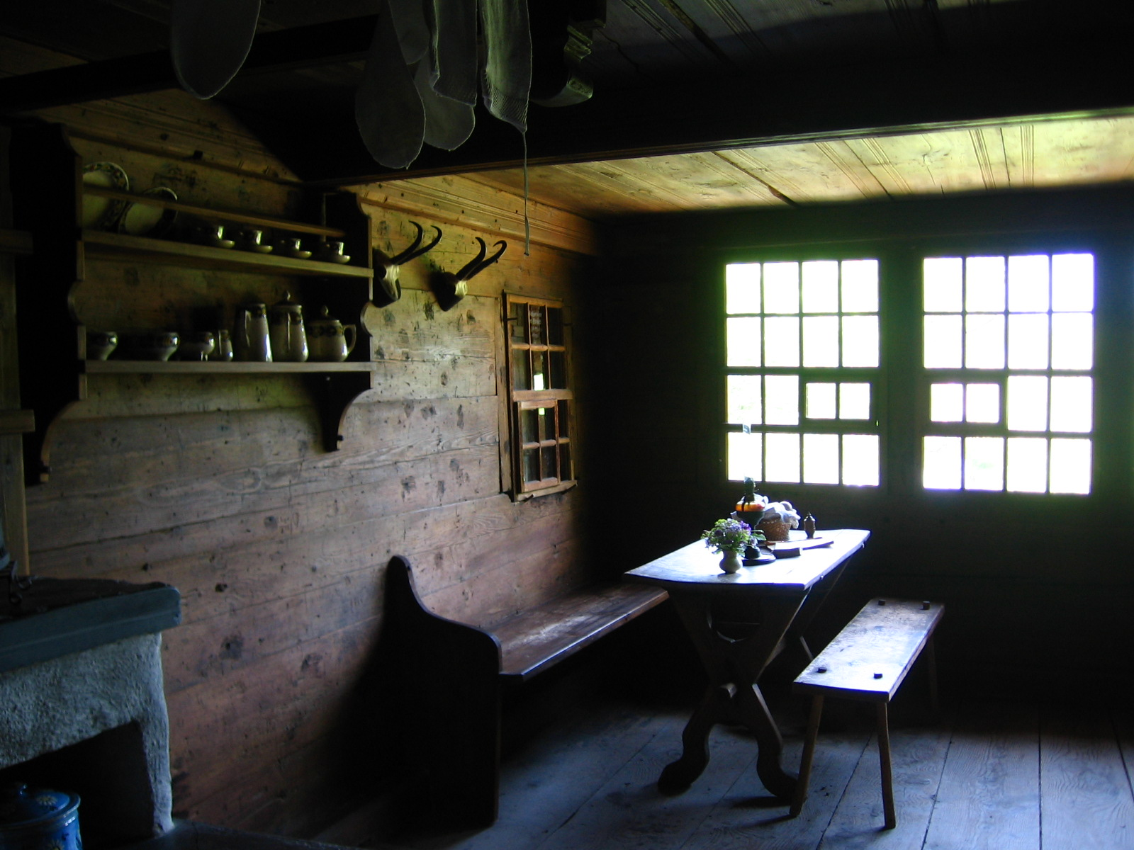 Musée suisse de l'habitat ruiral à Ballenberg